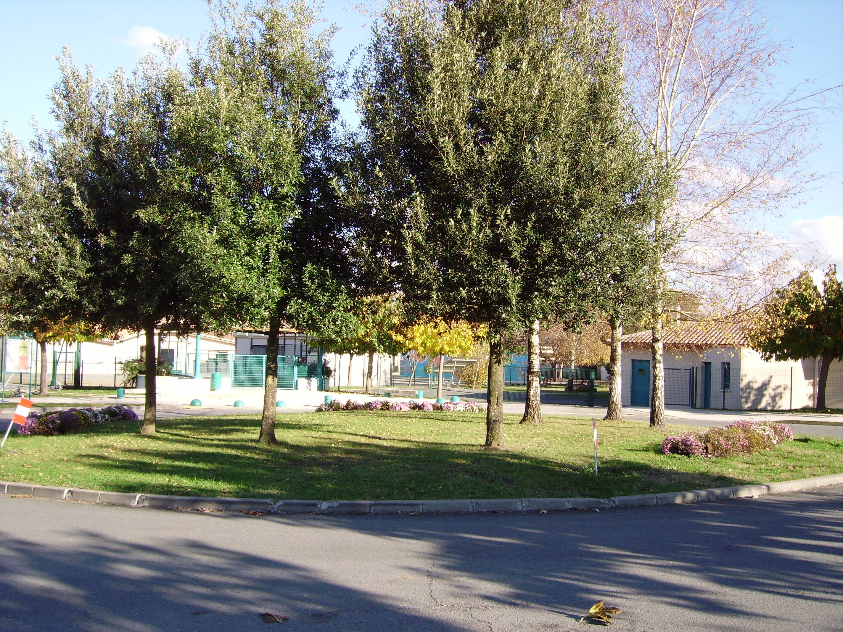 Ecole primaire Saint Médard d'Eyrans